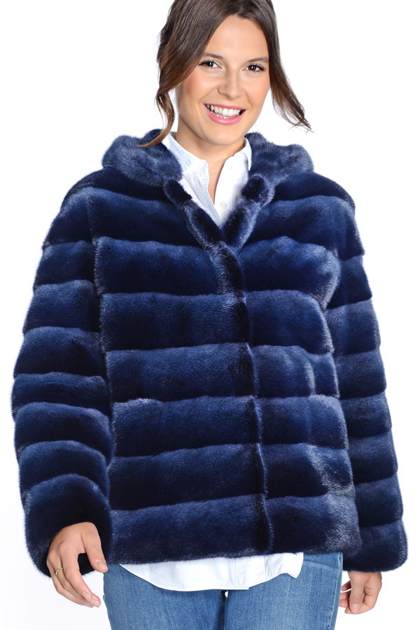 Internationaler Pelz-Design-Wettbewerb des deutschen Kürschnerhandwerks 2019. Prämierte indigoblau gefärbte Nerzjacke mit Kapuze, Pelzmanufaktur Halfmann, Düsseldorf.